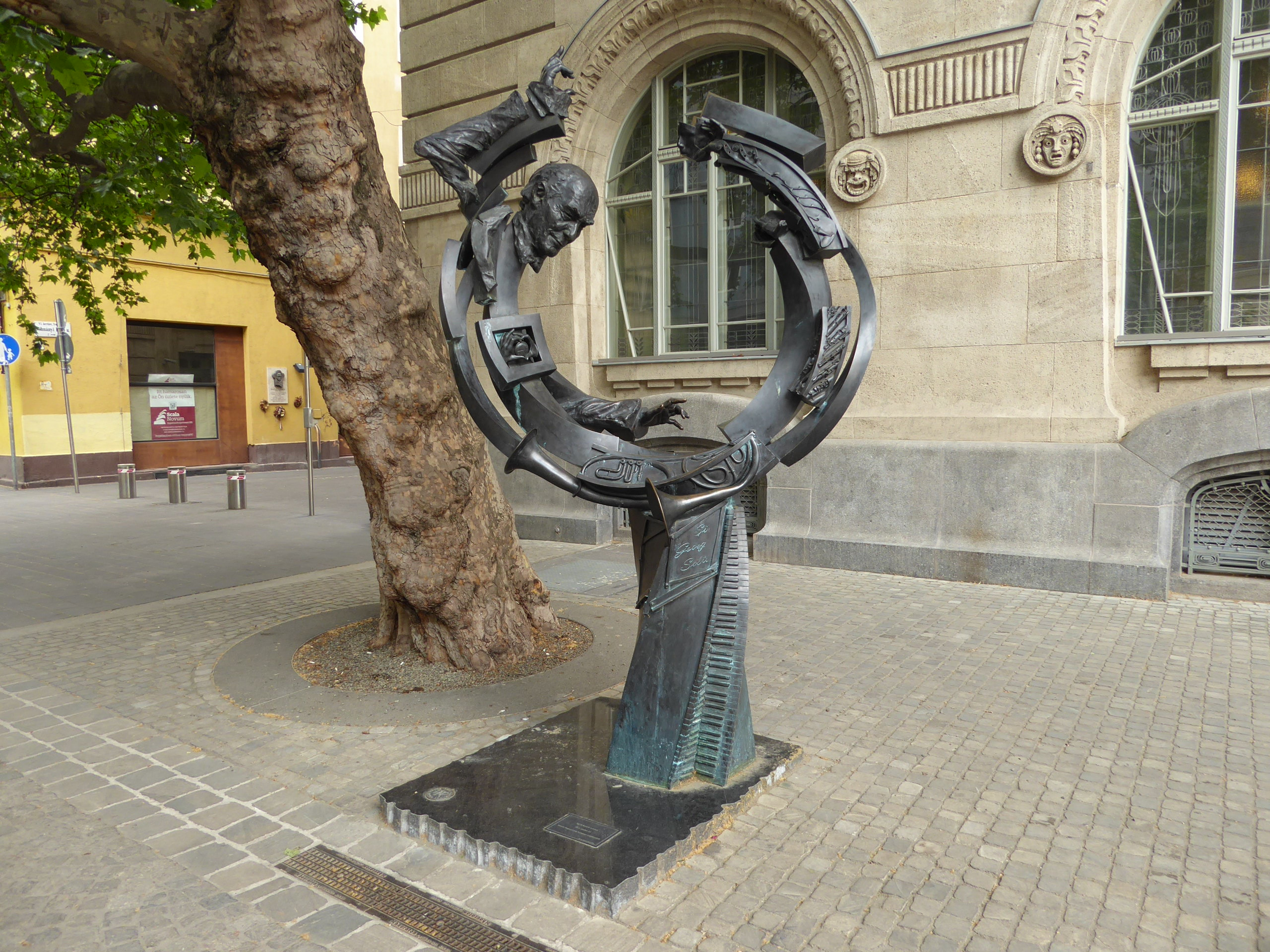 Sir Georg Solti emlékmű Budapest VI. kerület Liszt Ferenc téren, a Zeneakadémiához közel. Szobrász: Párkányi Raab Péter. A fénykép a szobrot oldalról mutatja. 2017-05-26-n készítettem.